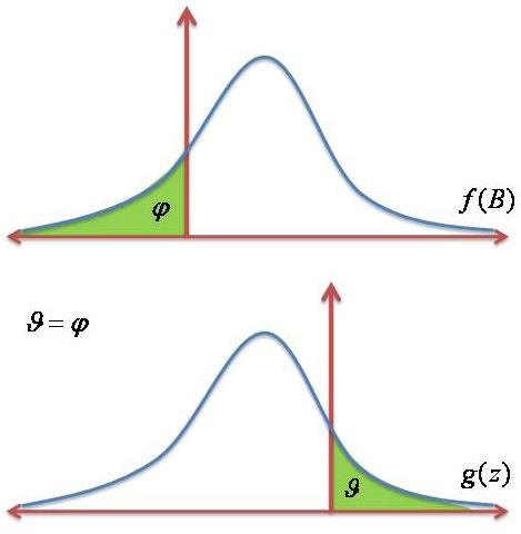 Equilibrio en los mercados por amenidades